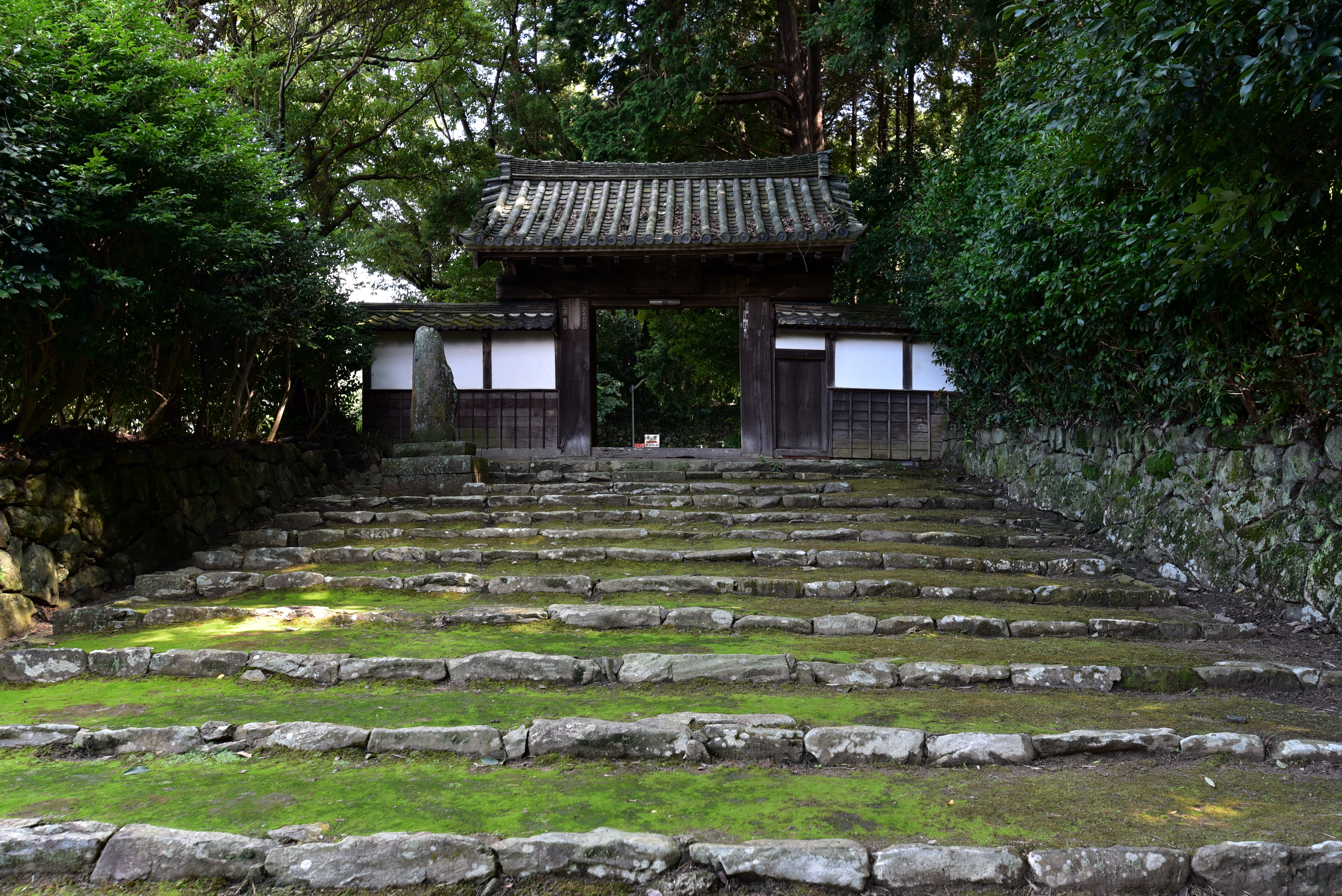 長圓寺山門 Nikon D750